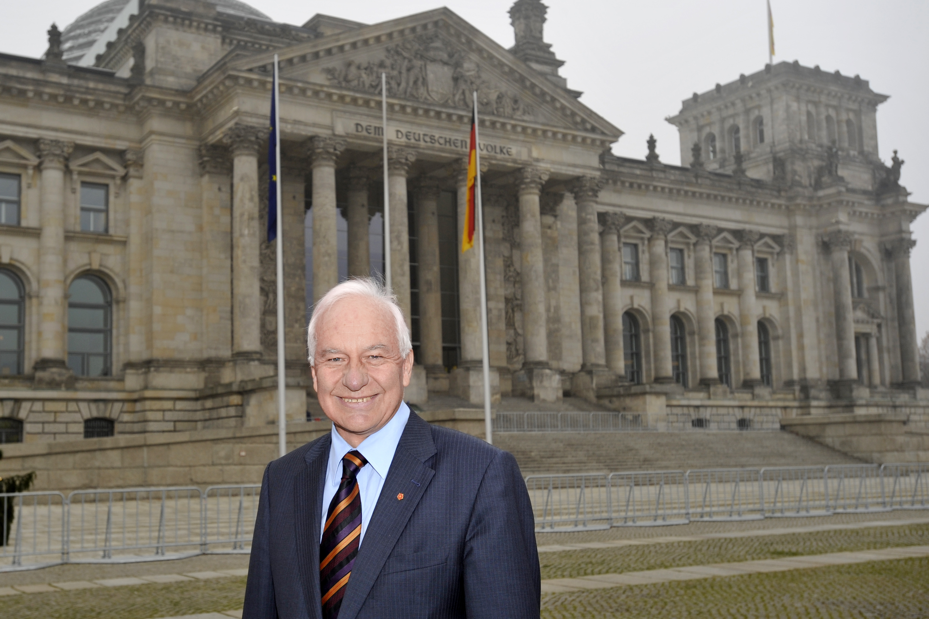 Cajus Caesar, MdB vor dem Reichstag in Berlin